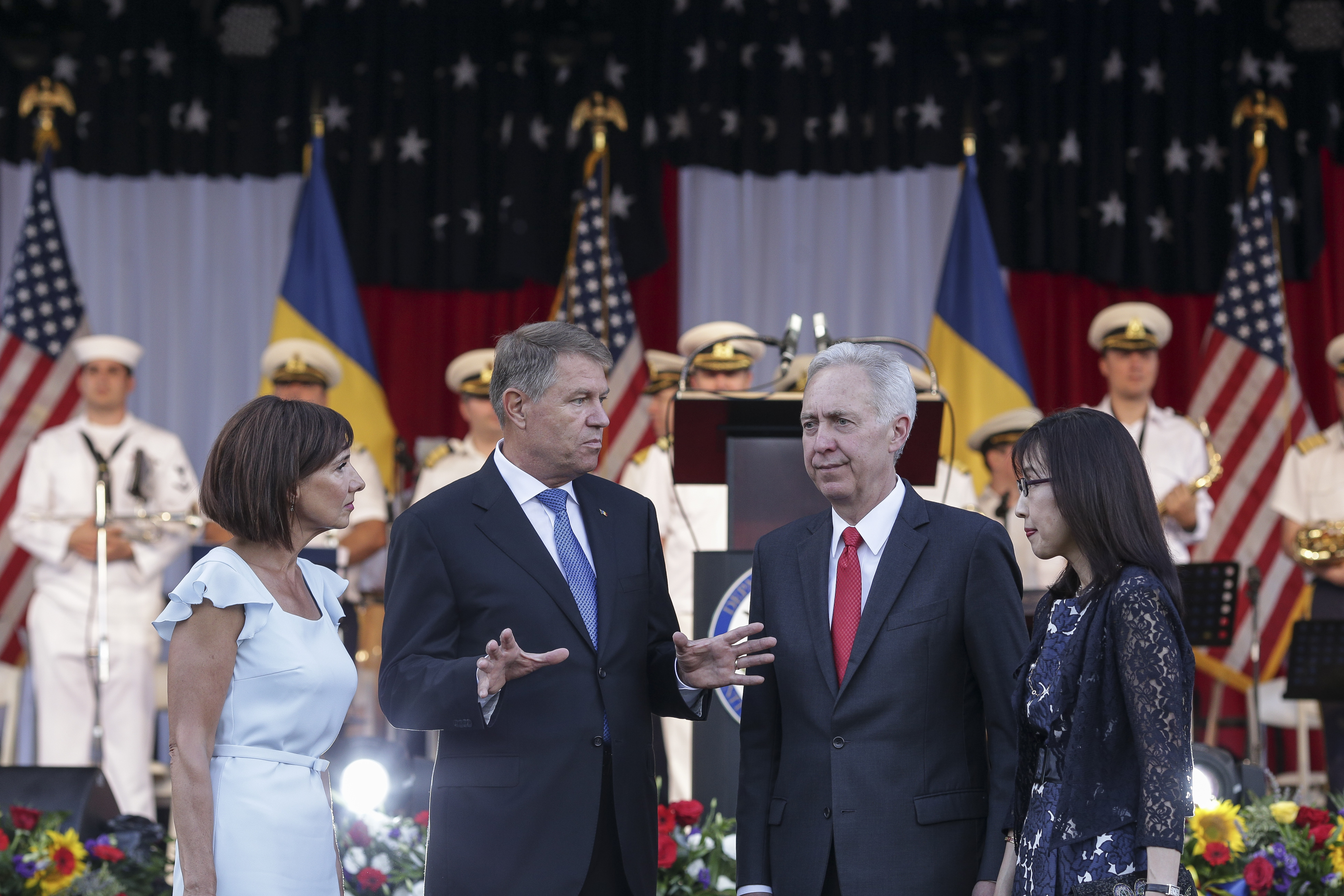 100 Years Of Friendship. A fost tema recepţiei de Ziua Independentei, când am sărbătorit împreună independenţa Americii, centenarul unităţii României şi prietenia dintre SUA şi România. Am avut lângă noi distinşi oaspeţi, prieteni dragi şi curajoşi, care nu s-au speriat de furtună şi au rămas alături de noi, pentru ca în final să fim binecuvântaţi cu un curcubeu superb. Mulţumim, România! 🇷🇴🇺🇸❤️ Octav Ganea / Inquam Photos --- 100YearsOfFriendship #July4th #IndependenceDay #ZiuaIndependentei #Bucharest #Bucuresti #Romania